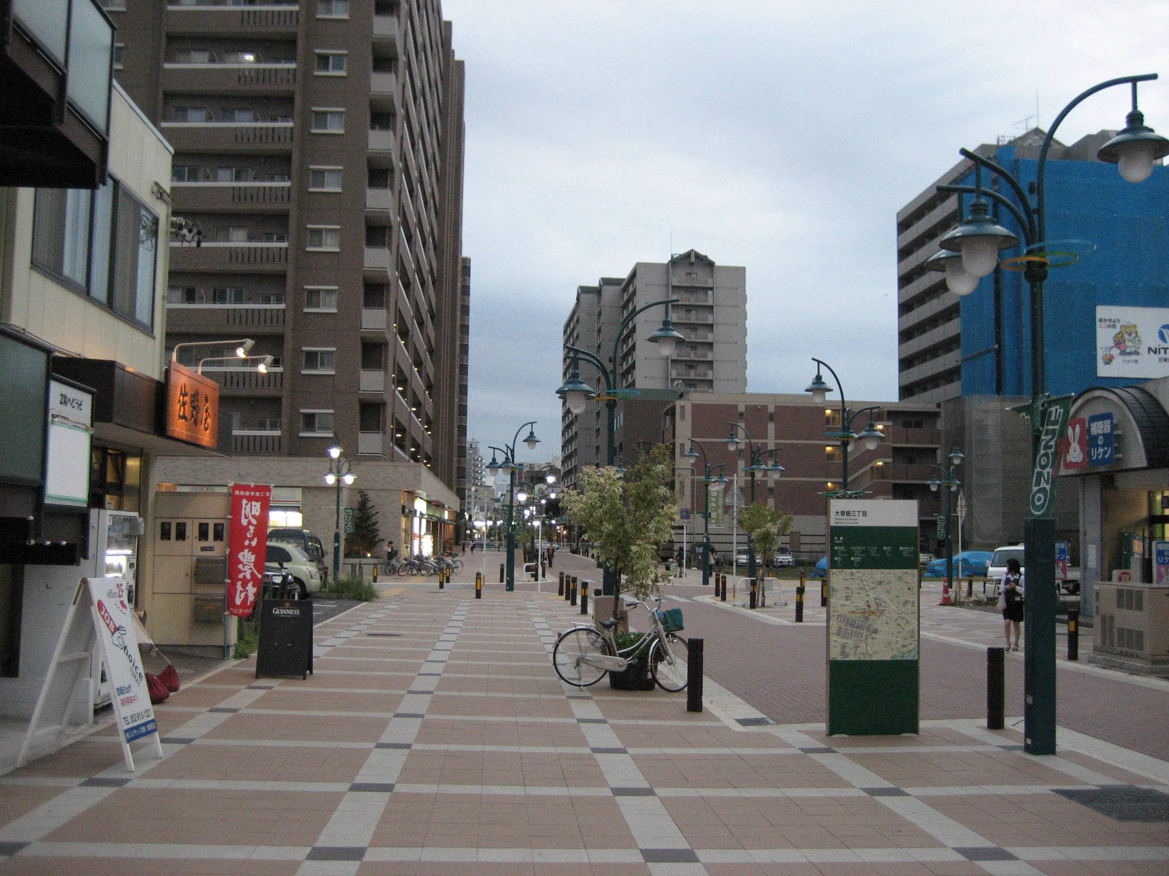 Ozone 3-chome